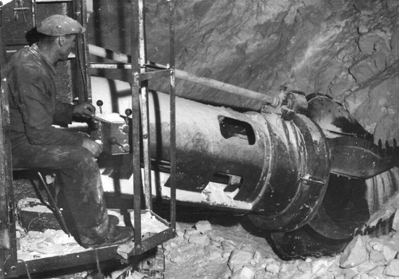 Bergarbeiter Kugelschaufler bedienend Volkswirtschaftsplan 1953: Bergbau wird weitgehend mechanisiert.UBz: Im Verlauf des Fünfjahrplans wird in der Deutschen Demokratischen Repubik der Bergbau weitgehend mechanisiert.Moderne Maschinen lösen die Handarbeit ab.Unser Bild zeigt einen neuen Kugelschaufler, der im Kaliwerk Sollstedt verwendet wird.Er fördert den Kali aus dem Schuppen auf ein Transportband, das ihn zur Weiterverarbeitung leitet.Zentralbild-Fiebig-859.A.V.Kno-Mi.Berlin W8 -30.12.52